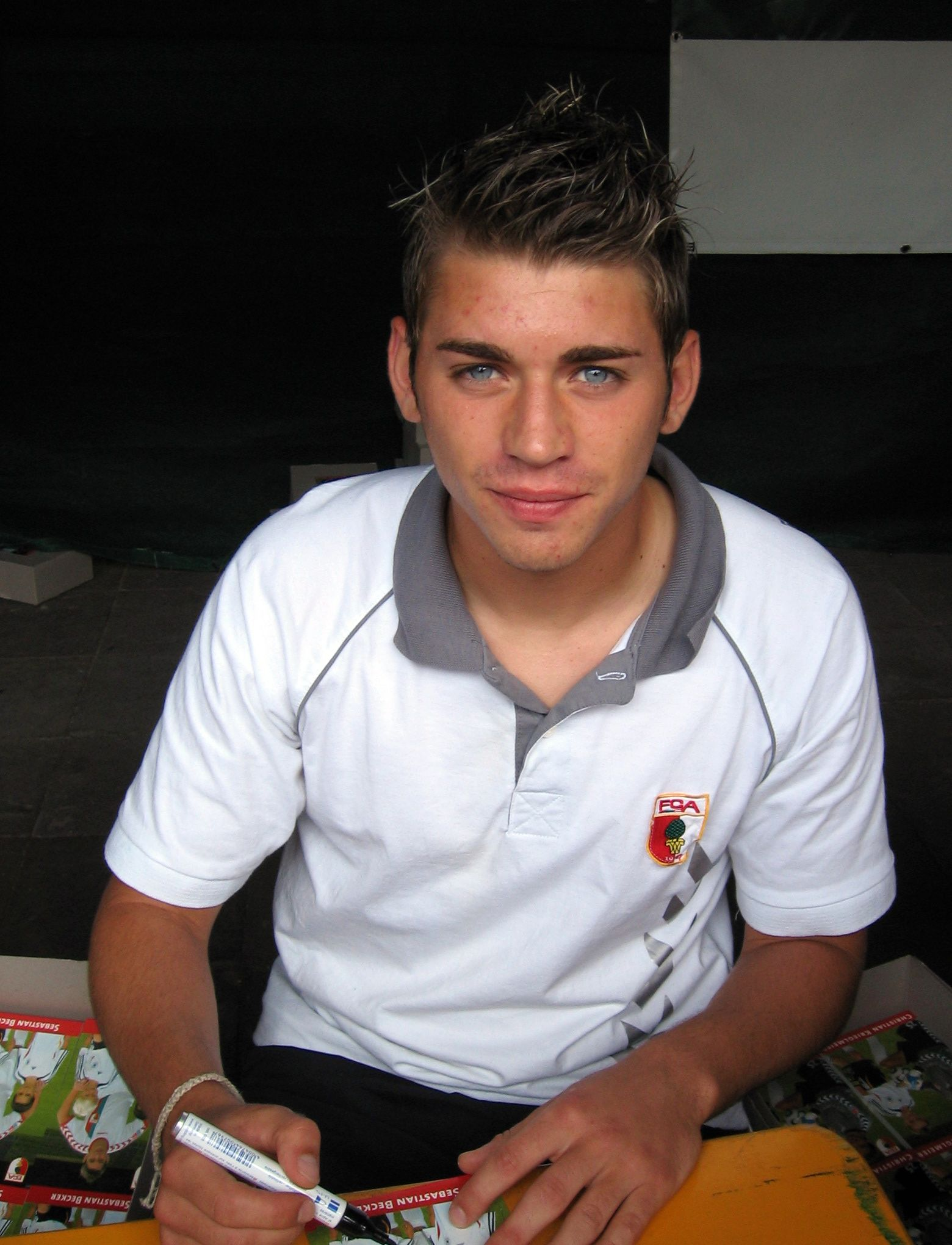 Sebastian Becker